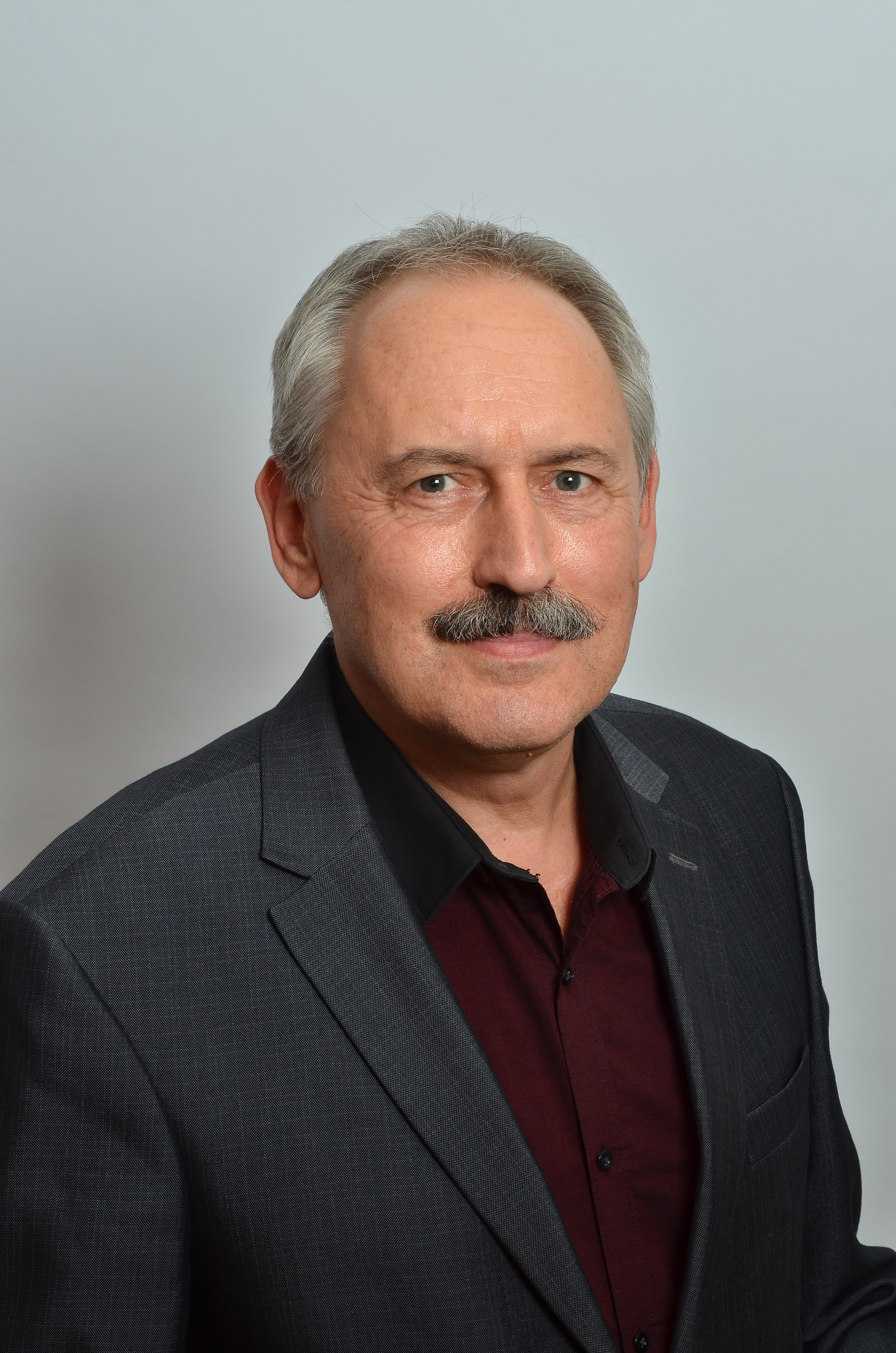 Ján Krtík